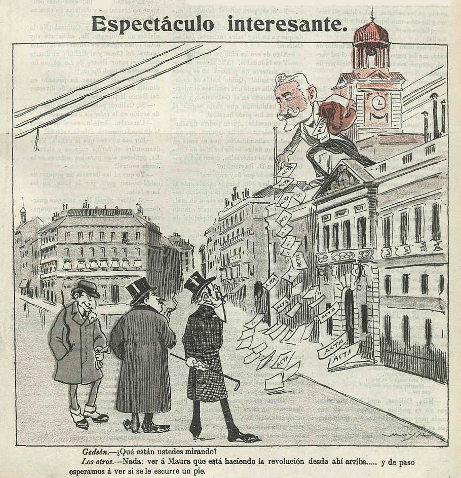 Espectáculo interesante, en la revista satírica española Gedeón.